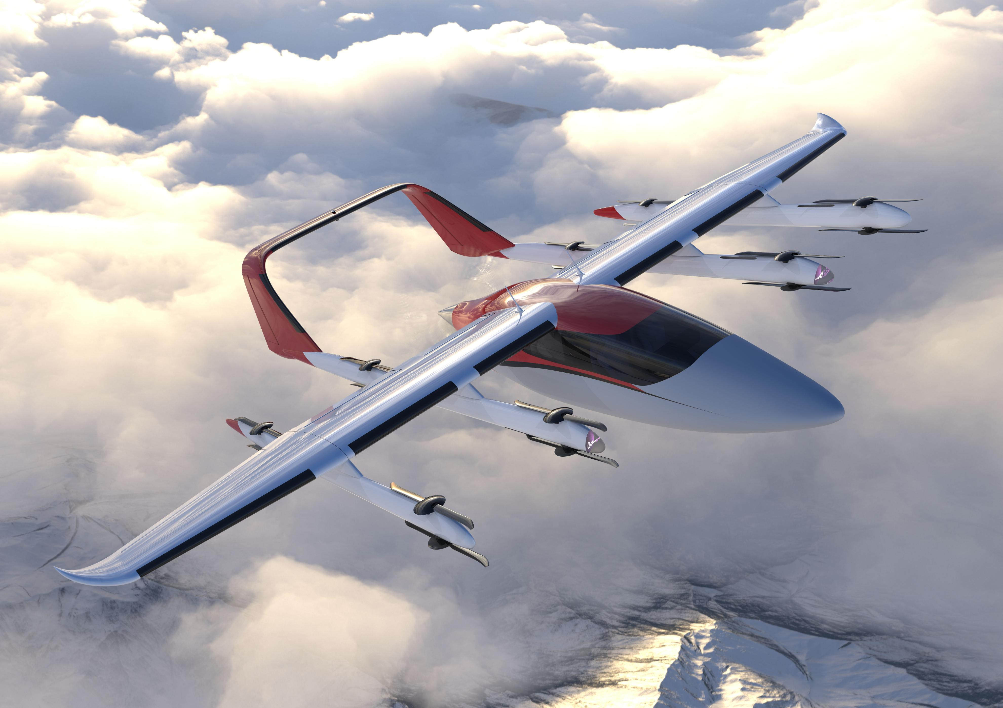 Hybridní autonomní letadlo s kolmým startem